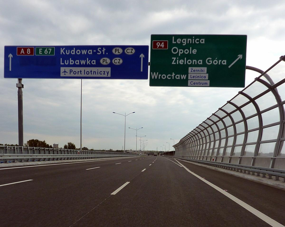 Jedziemy A8 od północy: za Mostem Rędzińskim zjazd na drogę nr 94 (ul. Lotnicza-Kosmonautów)